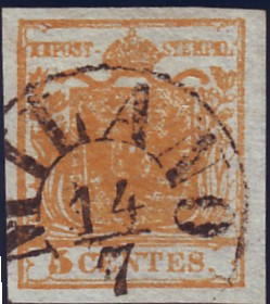 Austria-Lombardei-Nr_1H